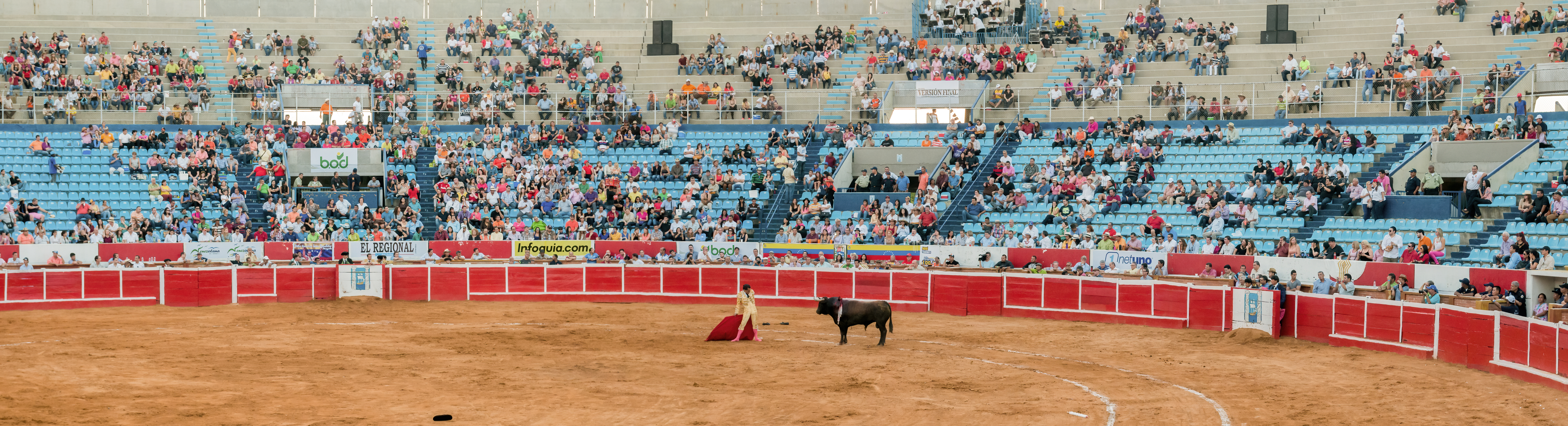 Plaza de Toros de Maracaibo Monumental